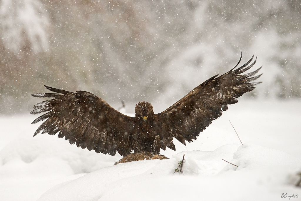 Aquila chrysaetos, Slovakia